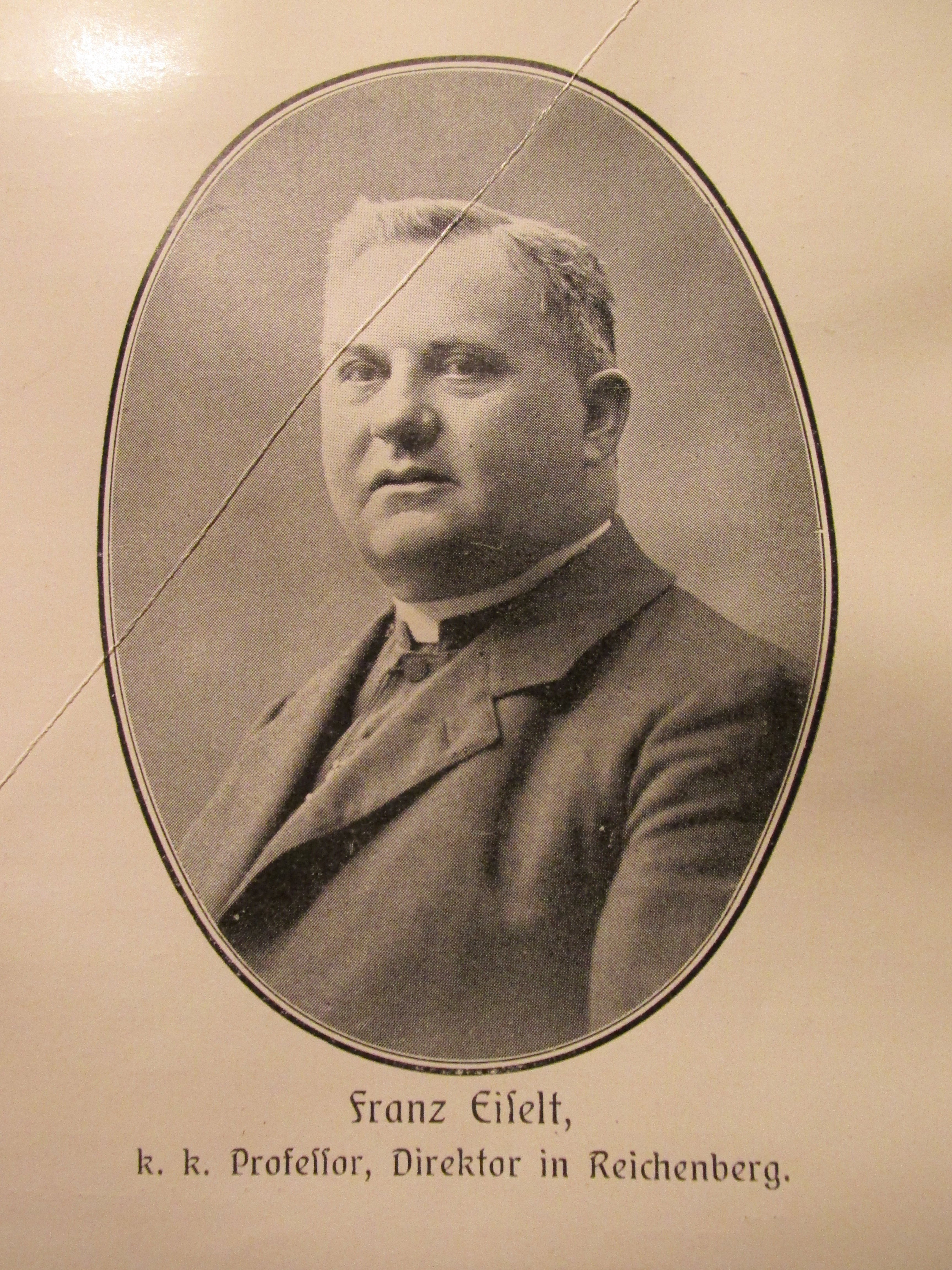 P. Franz Eiselt; * 13. 09. 1854 Varnsdorf, čp. 250; syn: Franz Eiselt - tkadlec a barvič, syn Franze Eiselta - tkadlece a Magdaleny roz. Heinisch; Maria, dcera Franze Reinische a Rosalie roz. Liebisch; gymnaziální studium na Gymnáziu v Bohosudově; filosoficko - teologické studia v Litoměřicích; kaplan v Rumburku; katecheta obecné, měšťanské, reálné, obchodní školy v Liberci; člen c.k. okresní školní rady pro zemský okres Liberec a také školní rada; Direktor der deutschen Privat - Lehrerinnenbildungsanstalt v Liberci; biskupský notář vlastník Der Zivil - Jubiläumsmedaillen ex 1898 (od 1908)